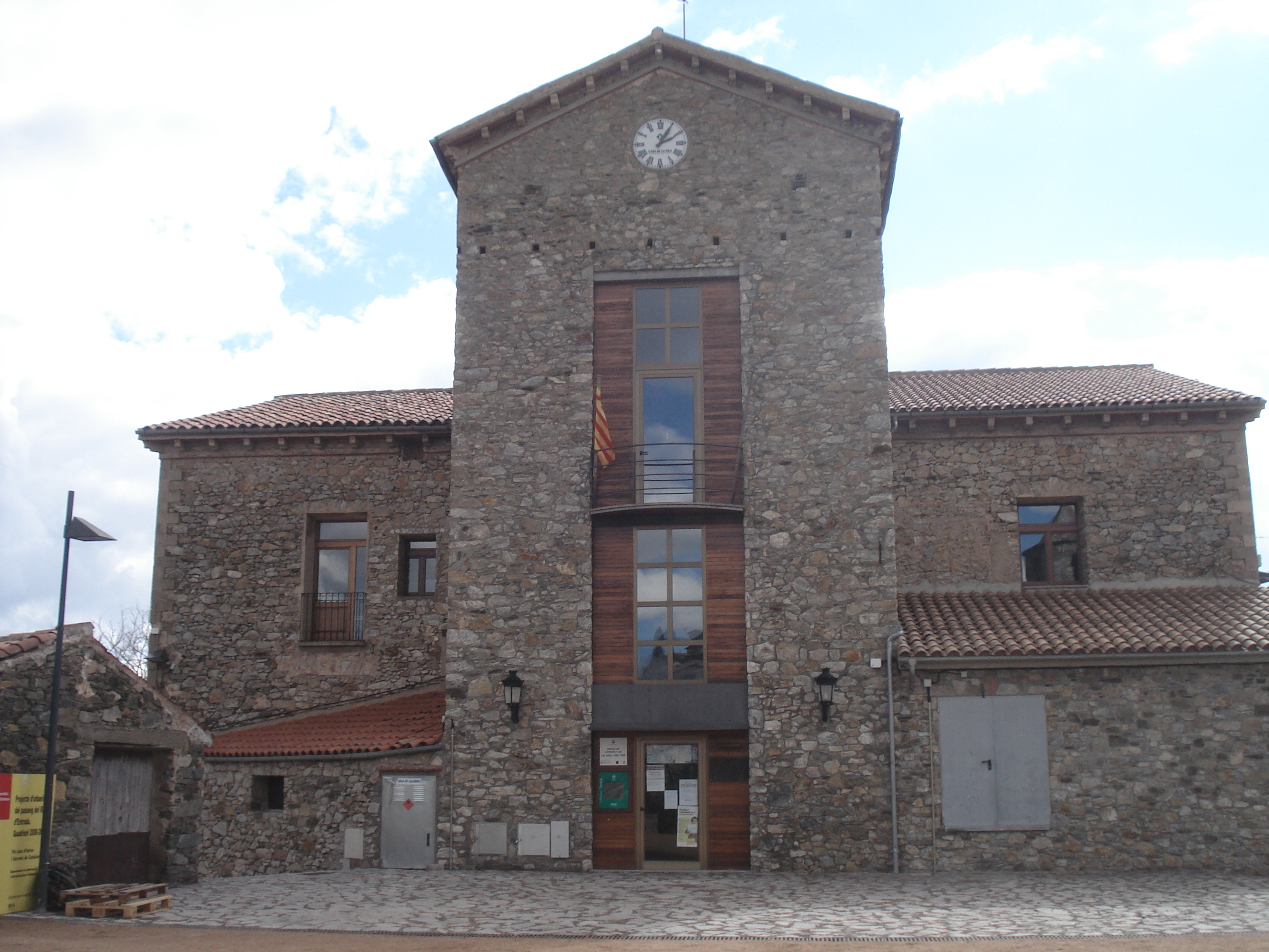 Edific de l'ajuntament de Molló